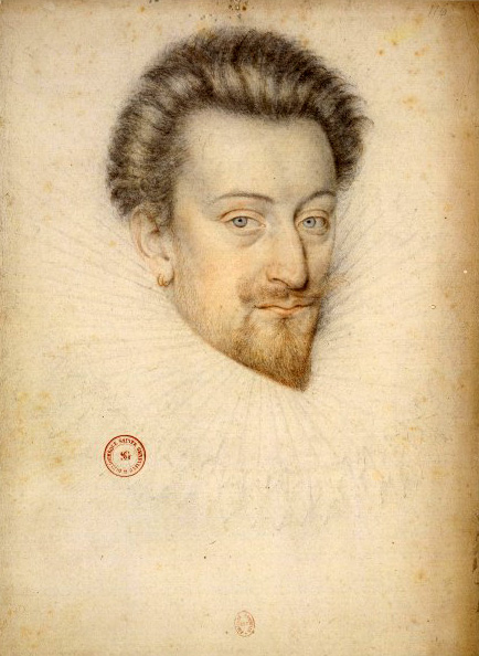 Anne, duc de Joyeuse. Recueil. Portraits dessinés de la Cour de France.